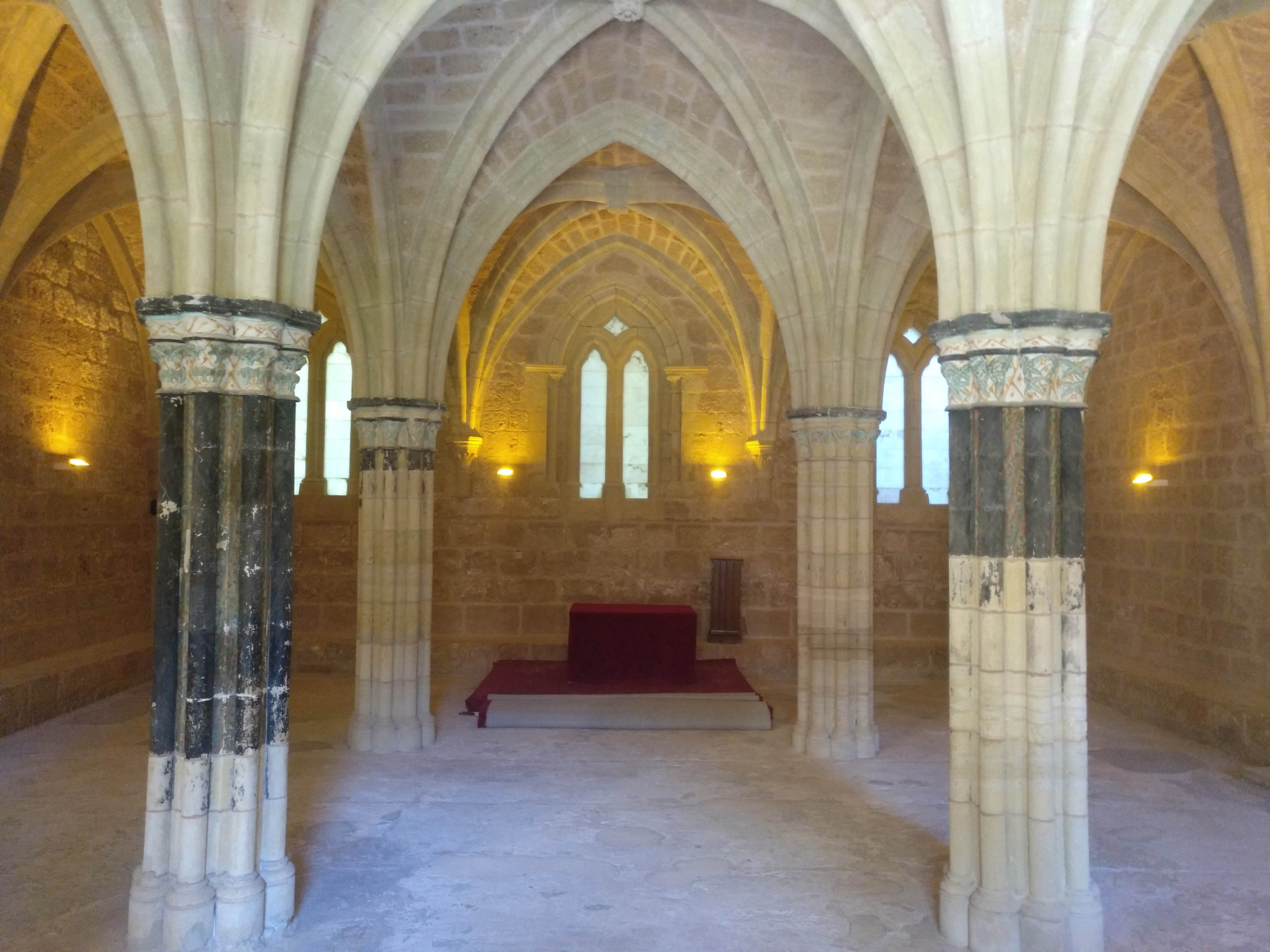 Sala Capitular del Monasterio de Piedra en Calatayud, España